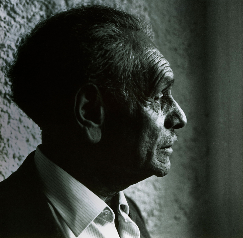 Der ungarische Bildhauer Lajos Barta im Bahnhof Rolandseck bei Bonn.